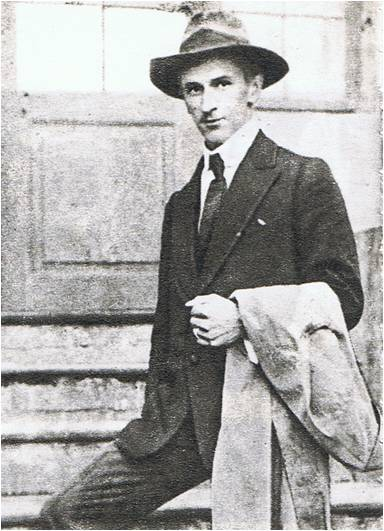 kpt. Tadeusz Puszczyński jako "Konrad Wawelberg" dowódca oddziału dywersyjnego w III Powstaniu śląskim